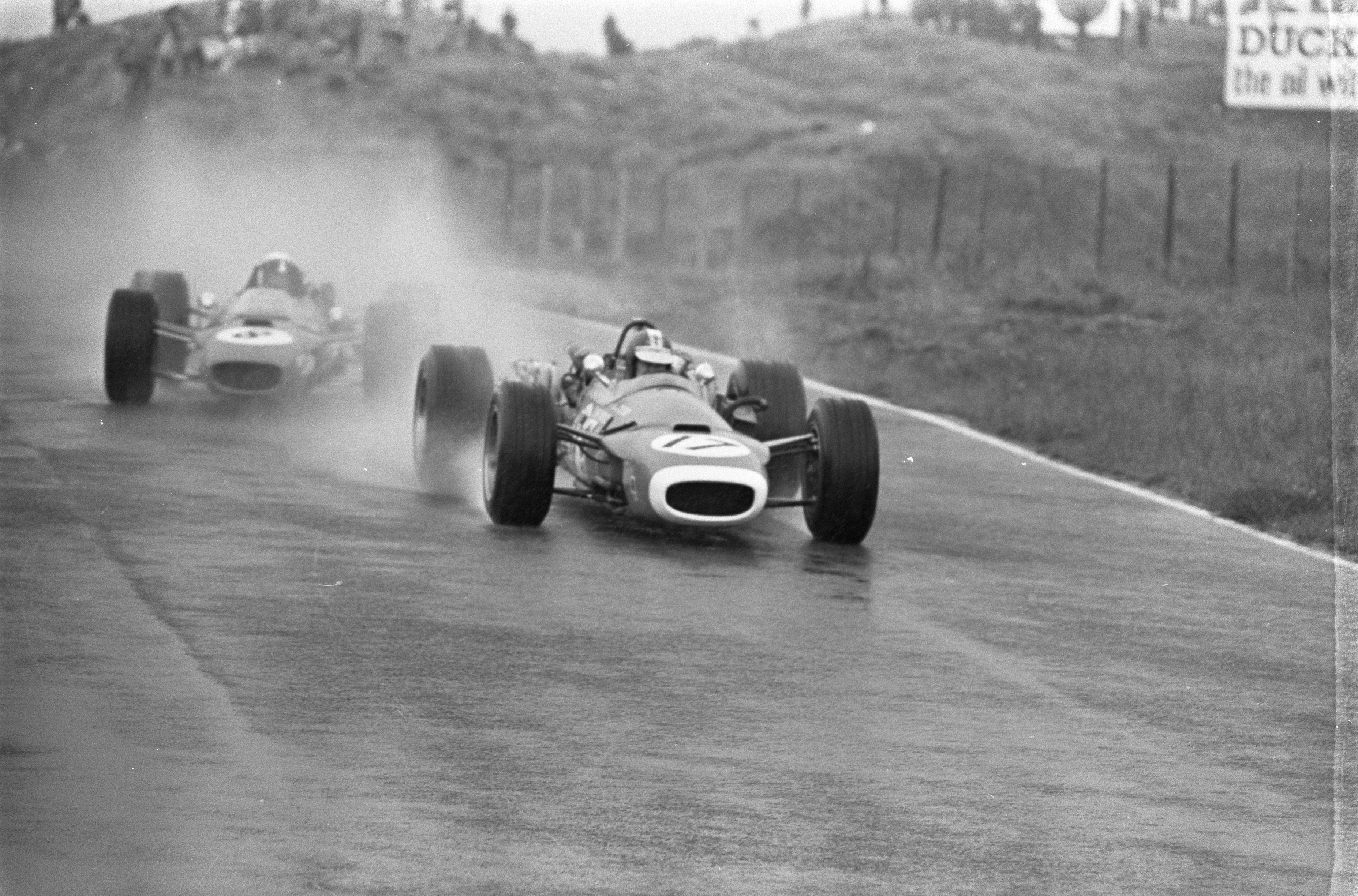 Grand Prix 68 Zandvoort . In de regen passeert Jack Stewart (links nummer 8) Beltoise (nummer 17) /.